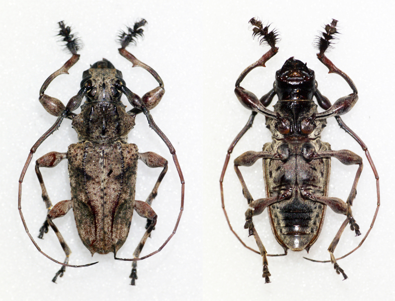 Schwarzer,1923 Sex: Male Data: 02-2011 - Junin - Satipo - Peru